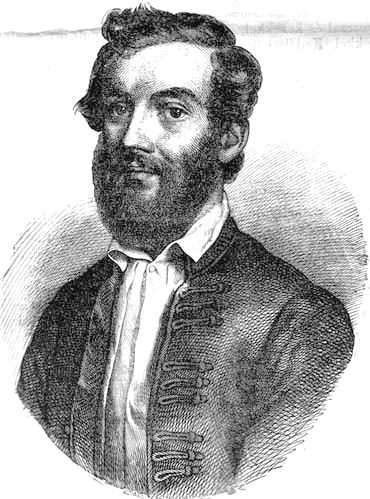 Vajda Péter (1808–1846) költő (Vasárnapi Ujság, 1858. december 12.)